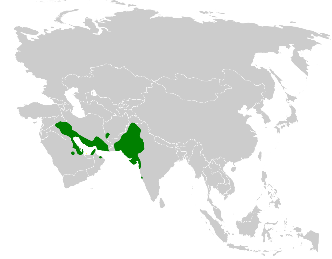 Pycnonotus leucotis distribution map, based on